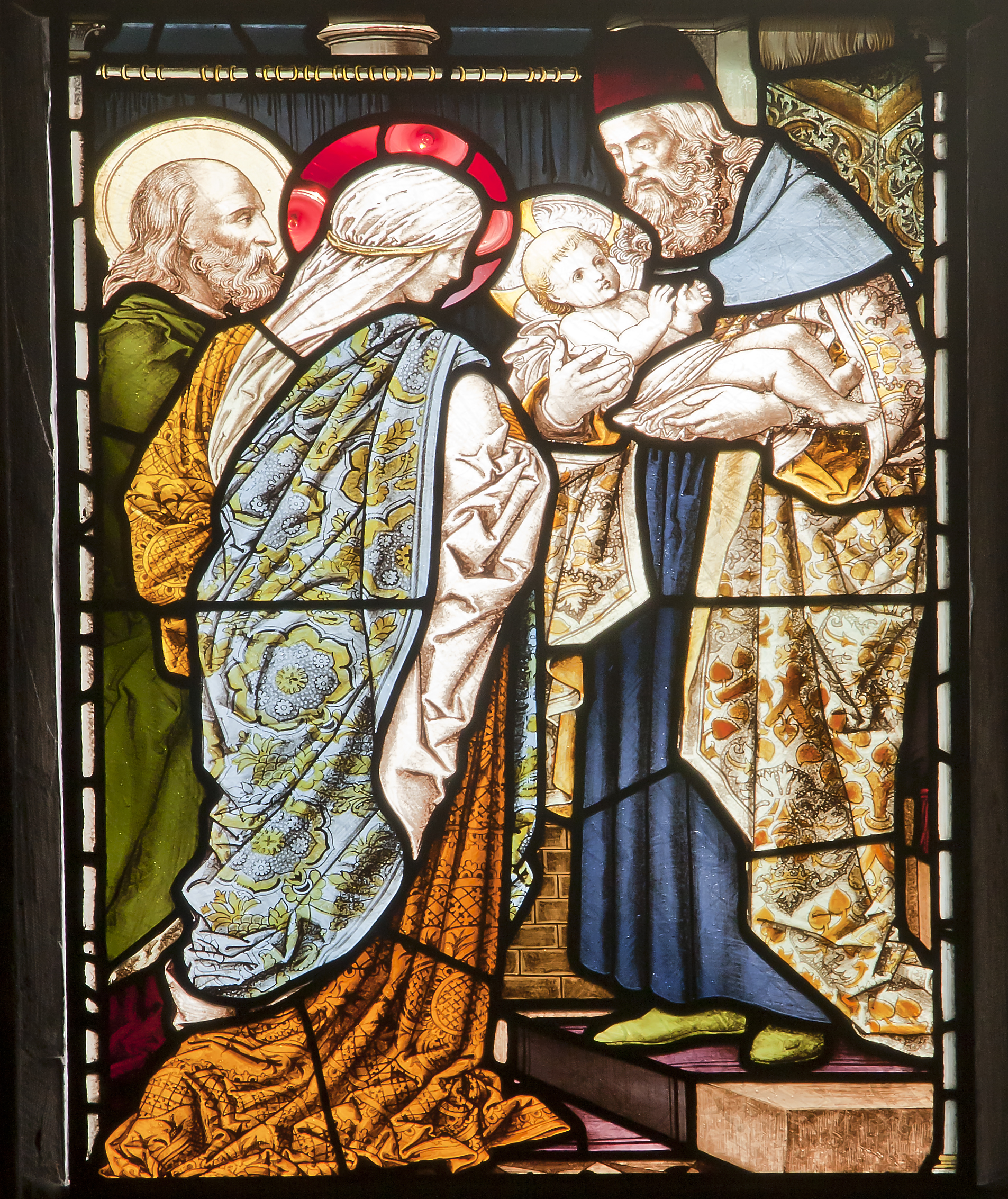 Kyrkfönster från 1800-talet i Nikolai kyrka i Örebro efter kartong av Carl Almquist. Motivet föreställer mötet med Symeon när Jesus bärs fram i templet.